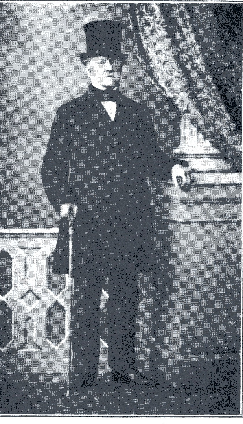 Der Heilbronner Stadtschultheiß Heinrich Titot